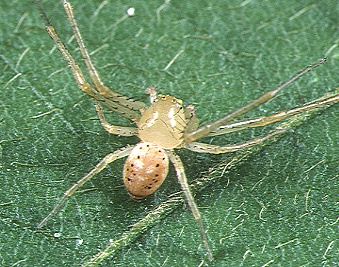 male Diaea subdola from Okinawa.